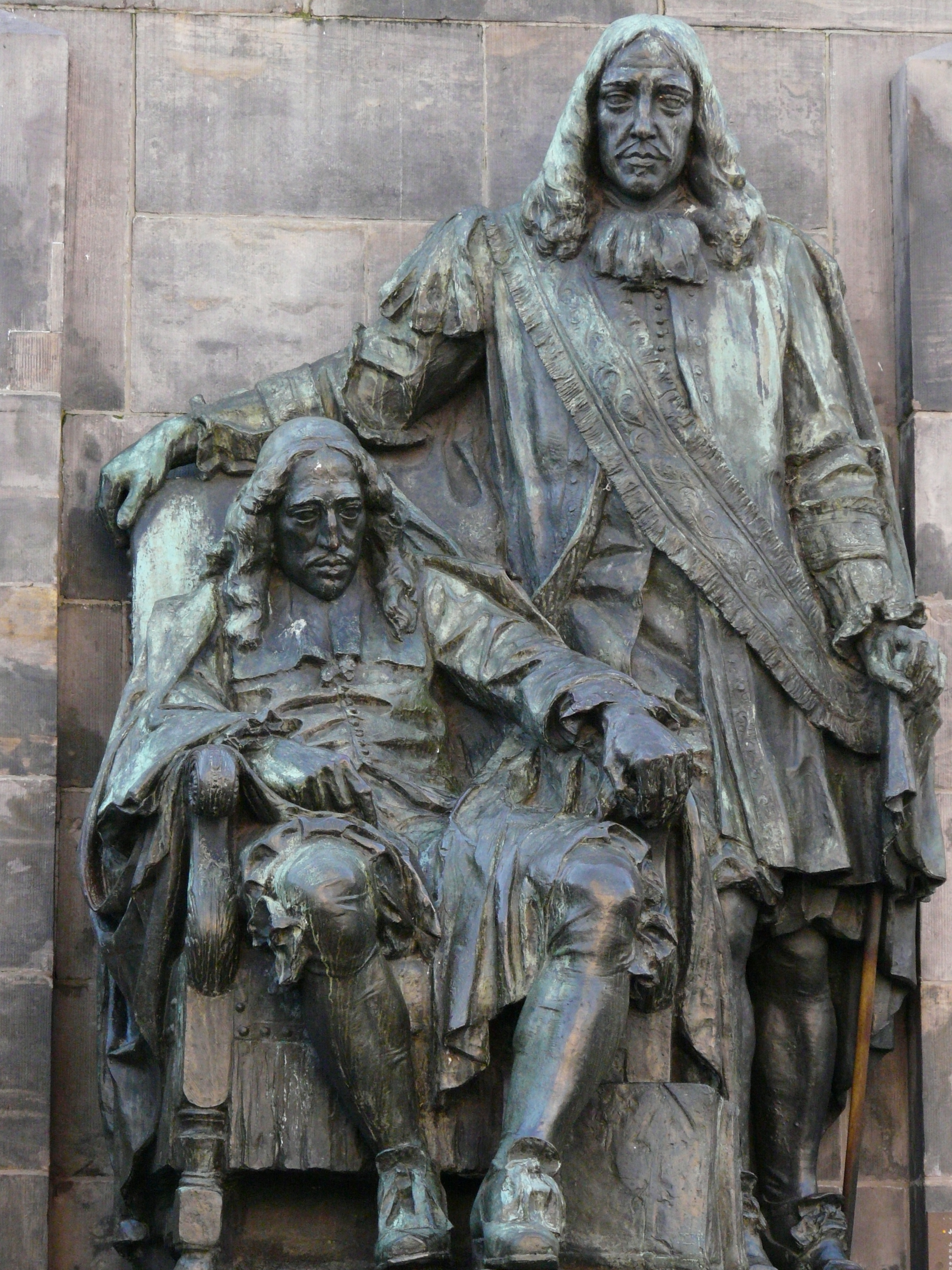 Standbeeld van Johan en Cornelis de Witt in Dordrecht centrum